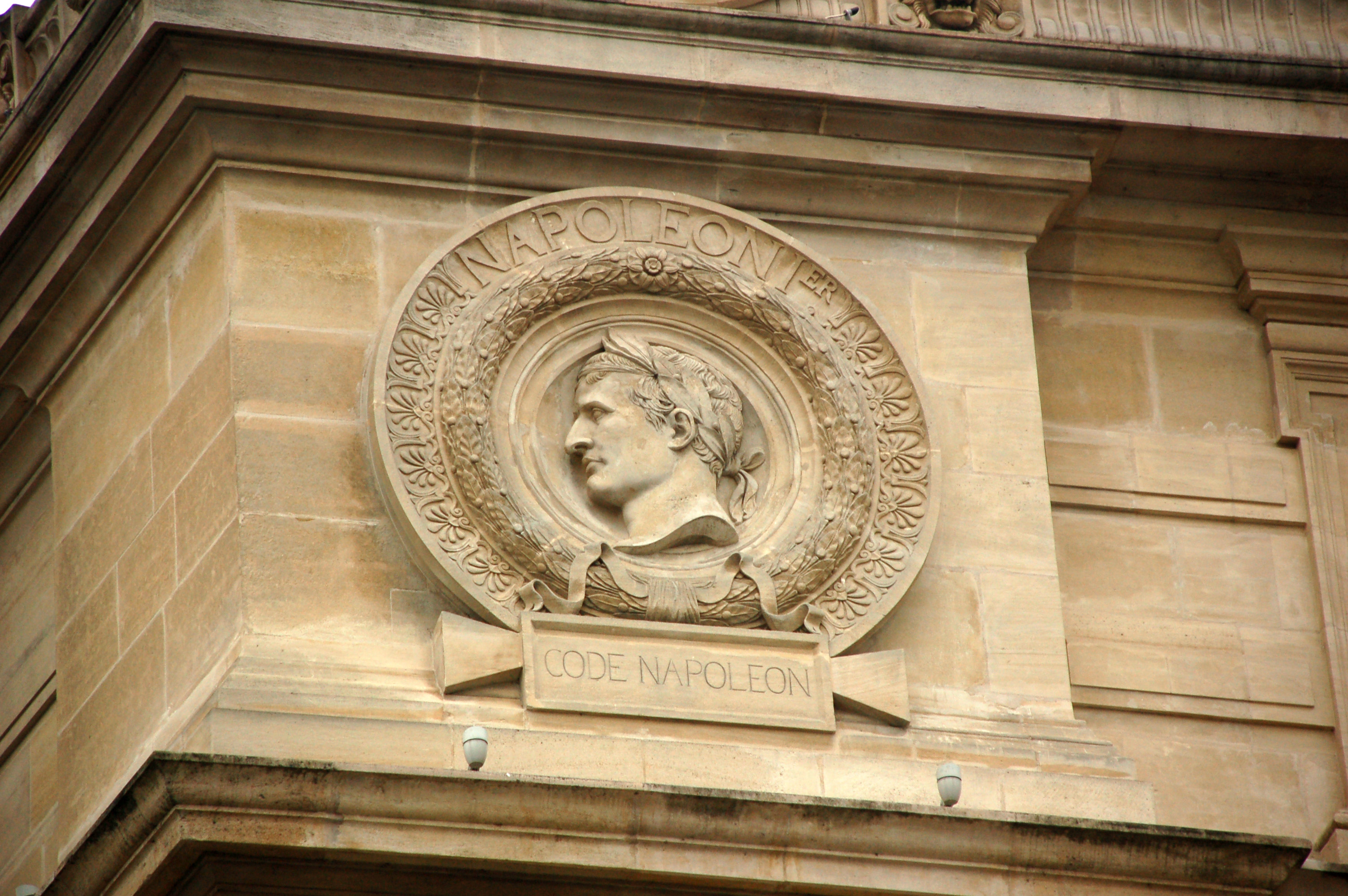 Portrait et monogramme de Napoléon Ier, sur le palais de Justice à Paris .